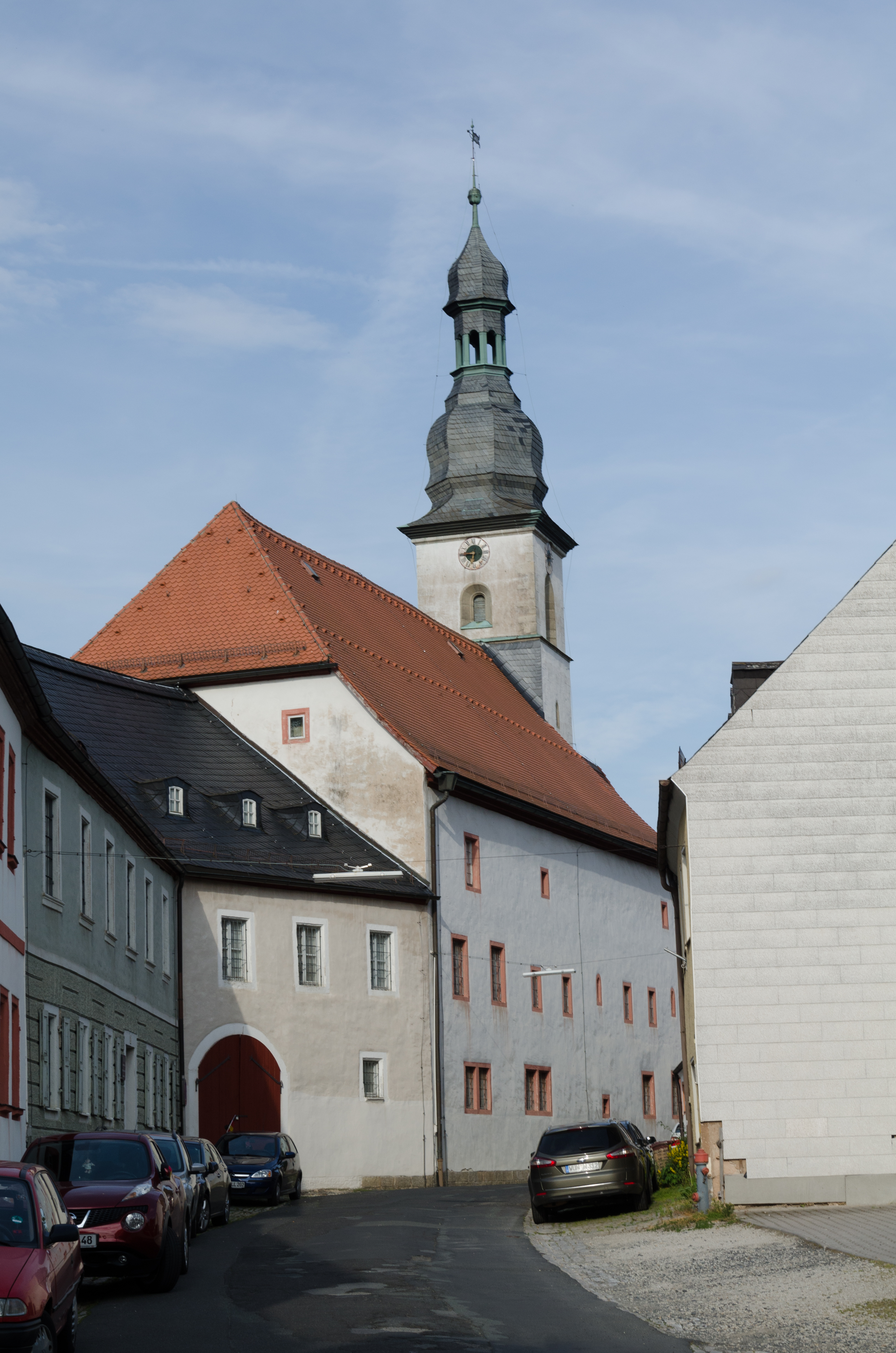 Spitalkirche in Wunsiedel